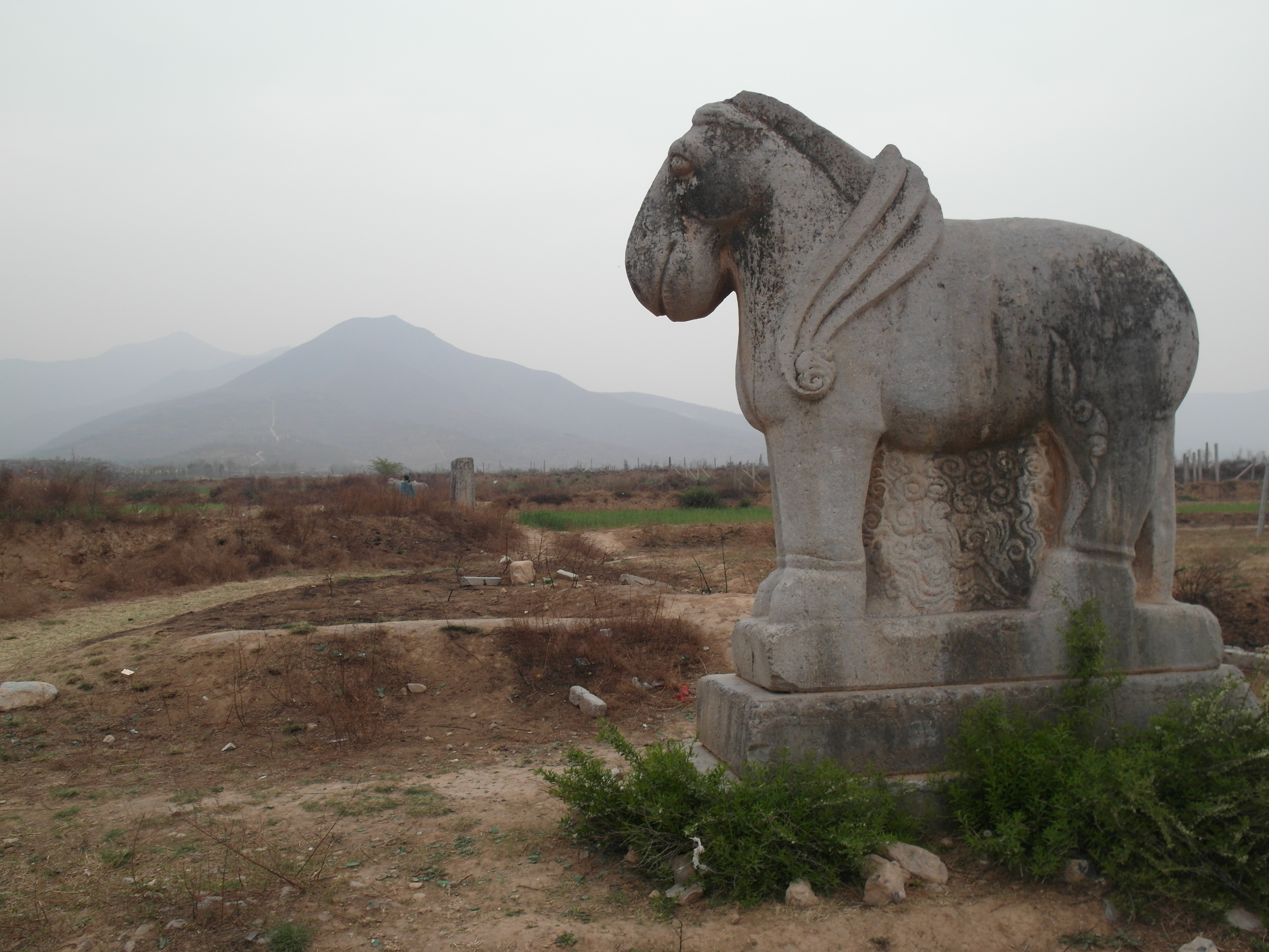 位于咸阳市泾阳县西北的仲山上